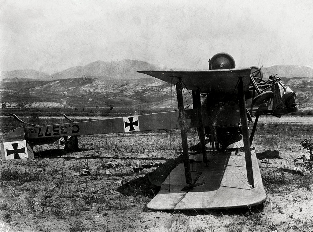 Bombenflugzeug Otto C.I. hat sich bei der Landung überschlagen. Thessaloniki-Front Eines von 13 gelieferten Exemplaren